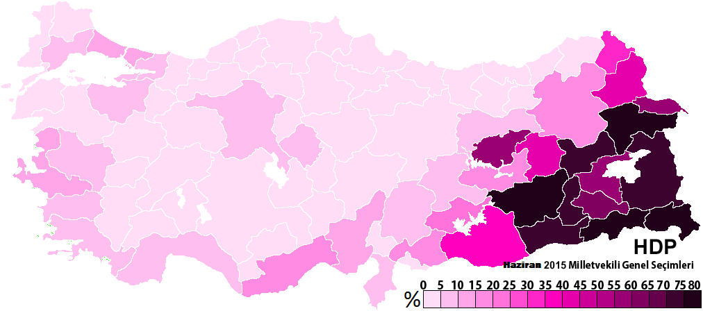 2015 HDP SEÇİM İL BAZLI SONUÇLARI